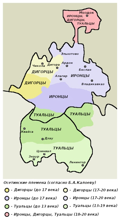 Карта обитания осетинских племён